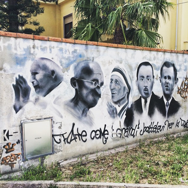 Peintures murales à San Sperate, Sardaigne